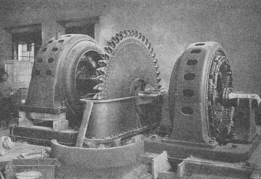 Geöffneter Maschinensatz des Kraftwerks Arniberg. Link der 14-polige 1000 kVA-Generator für das 42 Hz-Netz des Elektrizitätswerkes Rathausen, rechts der 16-polige 500 kVA-Generator für das 48 Hz-Netz des Elektrizitätswerkes Altdorf. Der Maschinensatz arbeitete mit einer Nenndrehzahl von 360 /min.